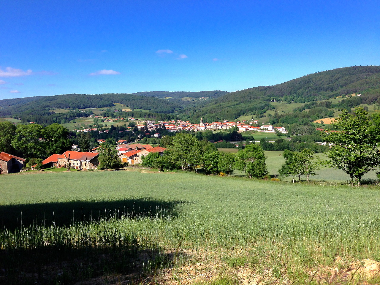 Une photographie du village de Saint-Anthème en juin 2013 depuis les hauteurs de ronchoux